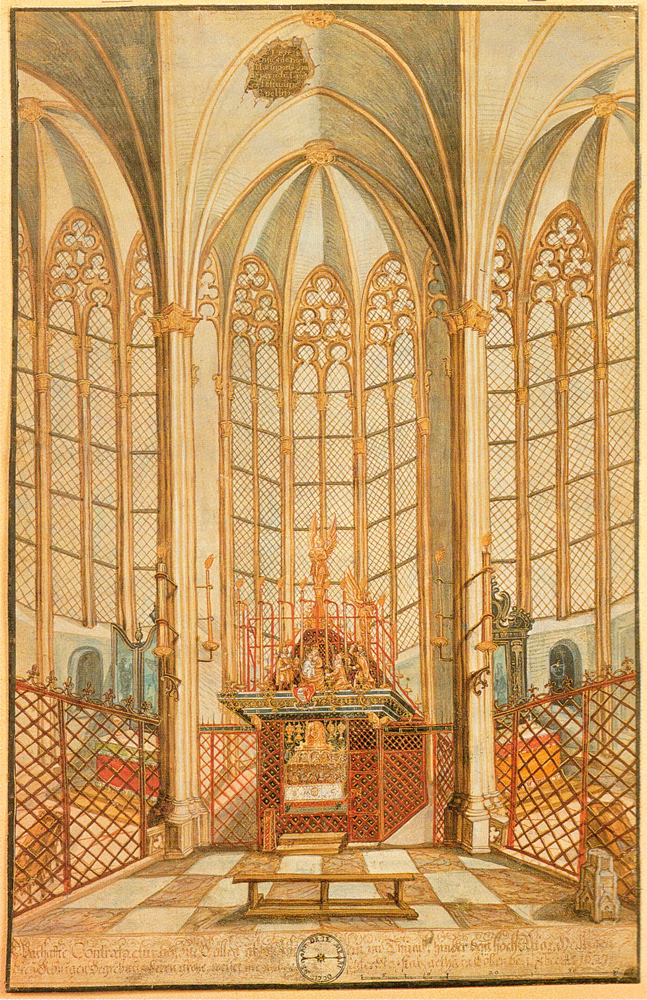 Innenansicht der Marienkapelle mit dem Gittergehäuse des Dreikönigenschreins